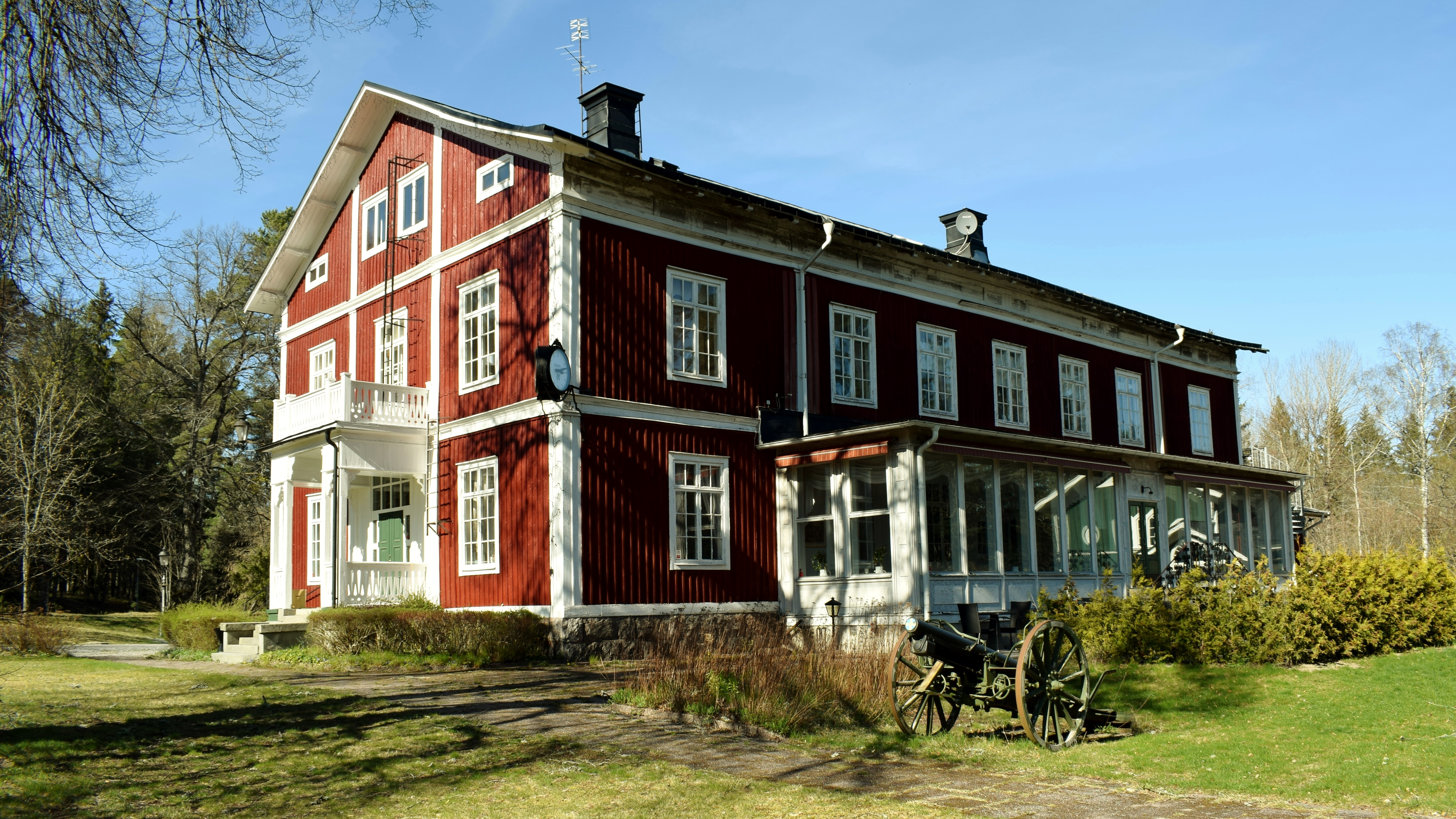 Plevnagården uppfördes 1886 som Sveriges första militärsjukhus. Vid den tidpunkten låg Södermanlands regemente i Malmköping. När regementet 1921 flyttade till Strängnäs, blev Plevnagården seminarium för småskolelärarinnor och passande nog blev det senare ett vilohem för samma yrkeskategori. Sedan 1980 drivs Plevnagården som hotell och konferensanläggning.